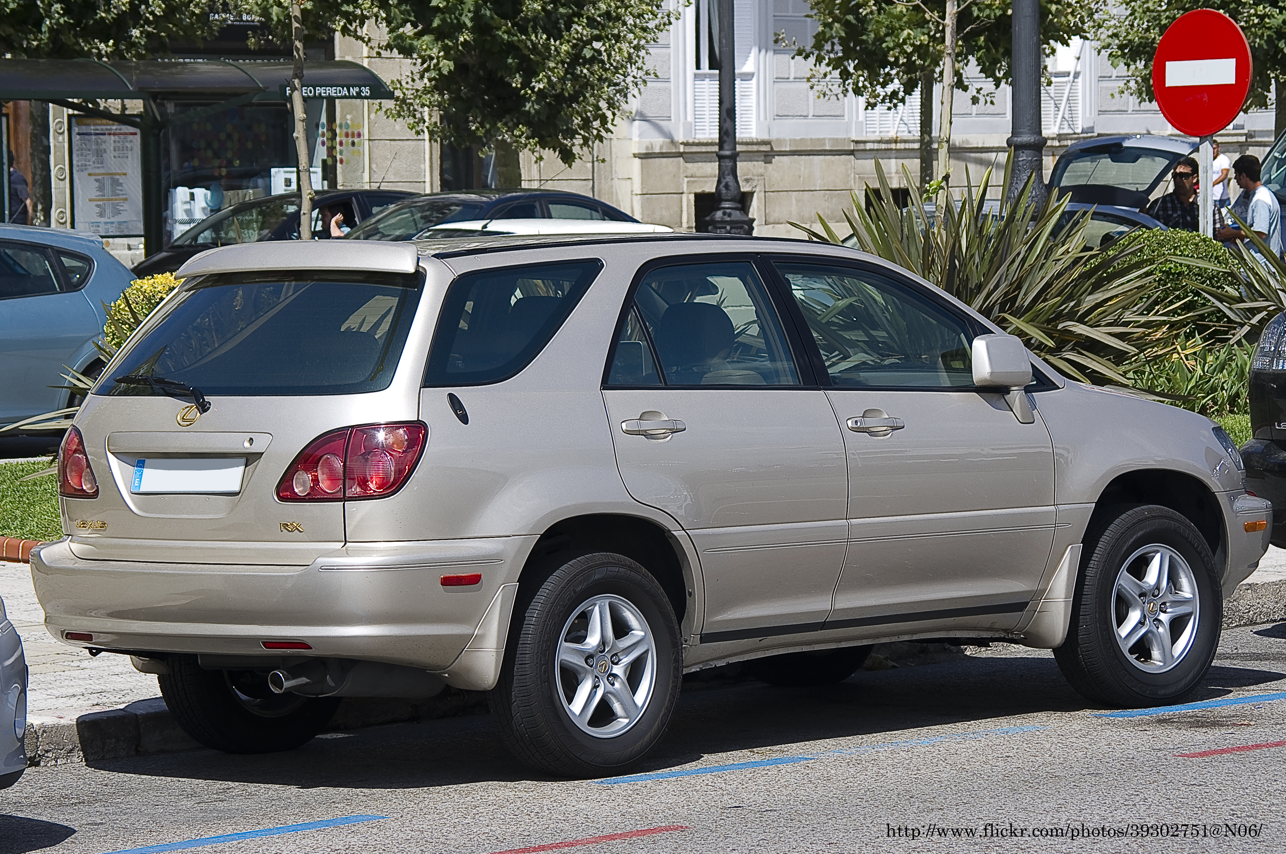 US-spec.